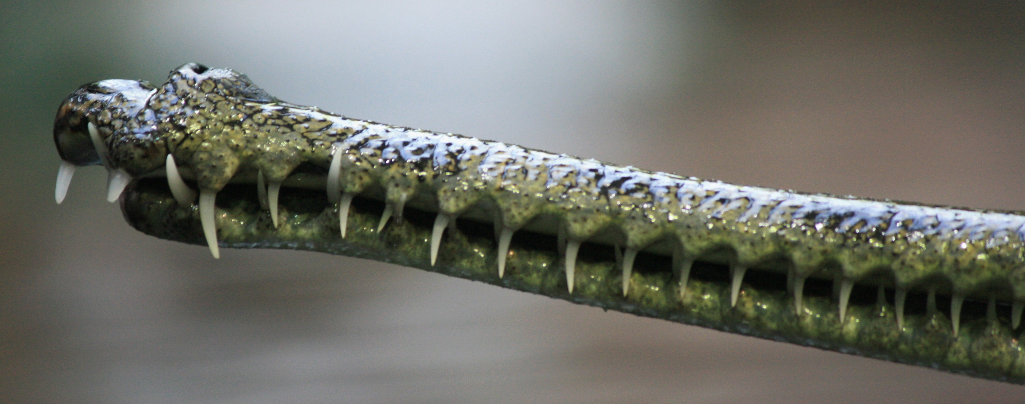 Gaviál indický v pražské Zoo